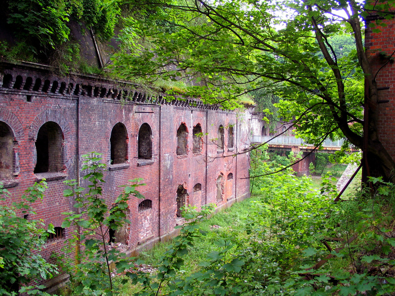 Fort XI Twierdzy Toruń